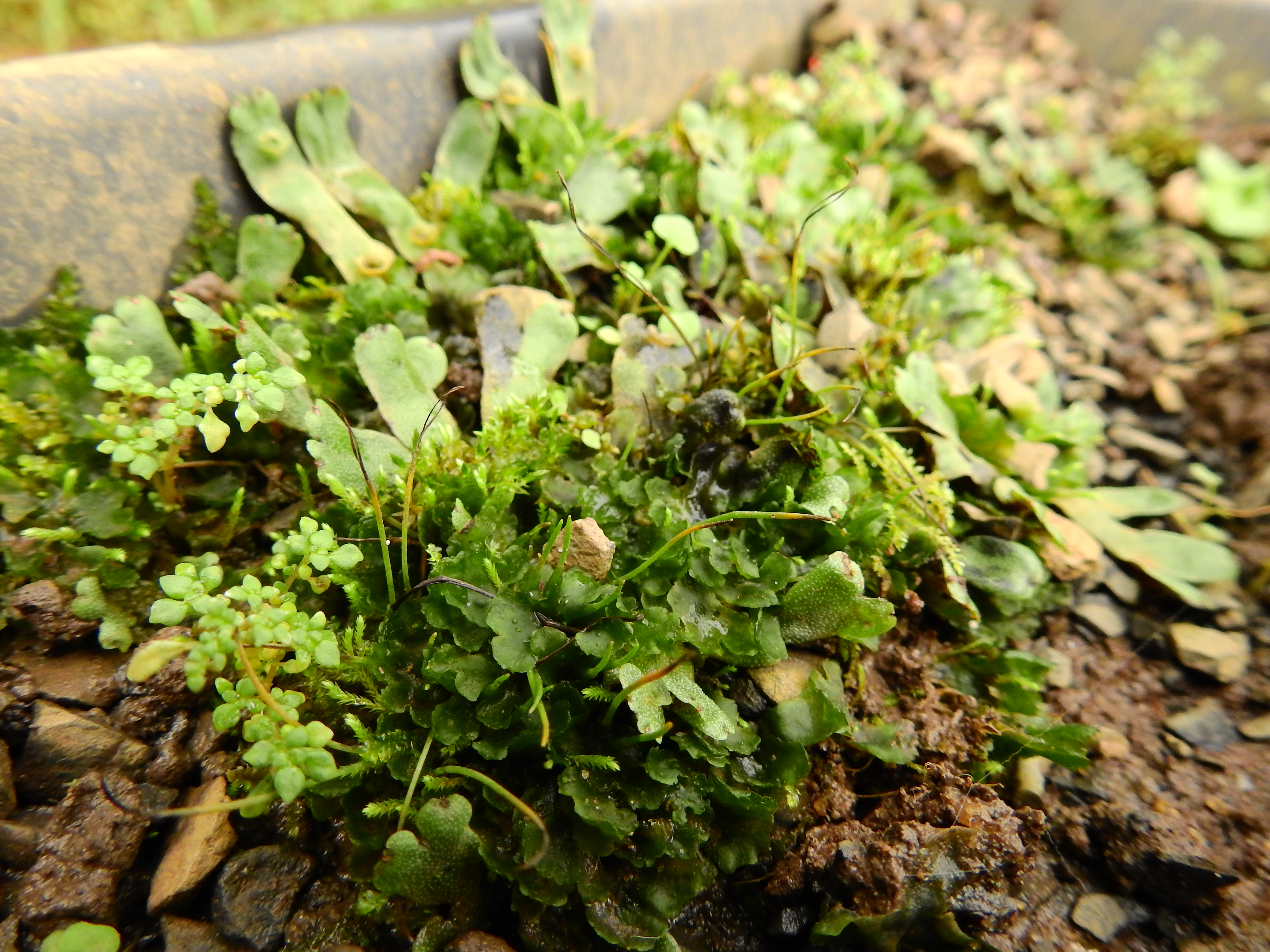 Foto tirada de um Antócero (Phaeoceros) na Universidade Federal de São Carlos - SP